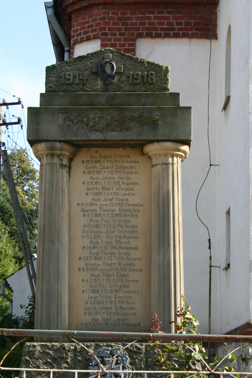 Miłowice (dodatkowa nazwa w j. niem. Mühlsdorf) – wieś w Polsce położona w województwie opolskim, w powiecie prudnickim, w gminie Biała.